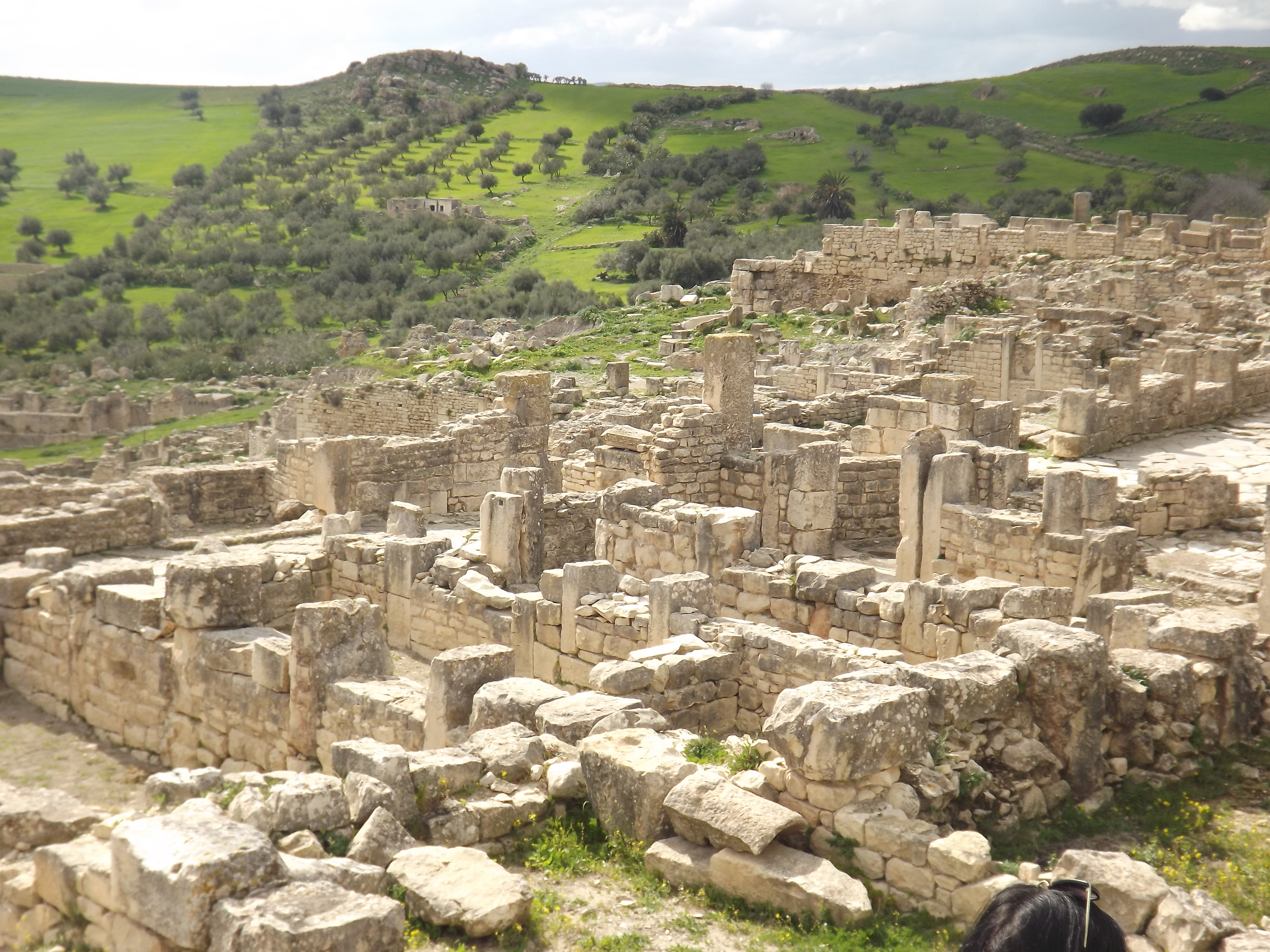 Site archéologique de Dougga